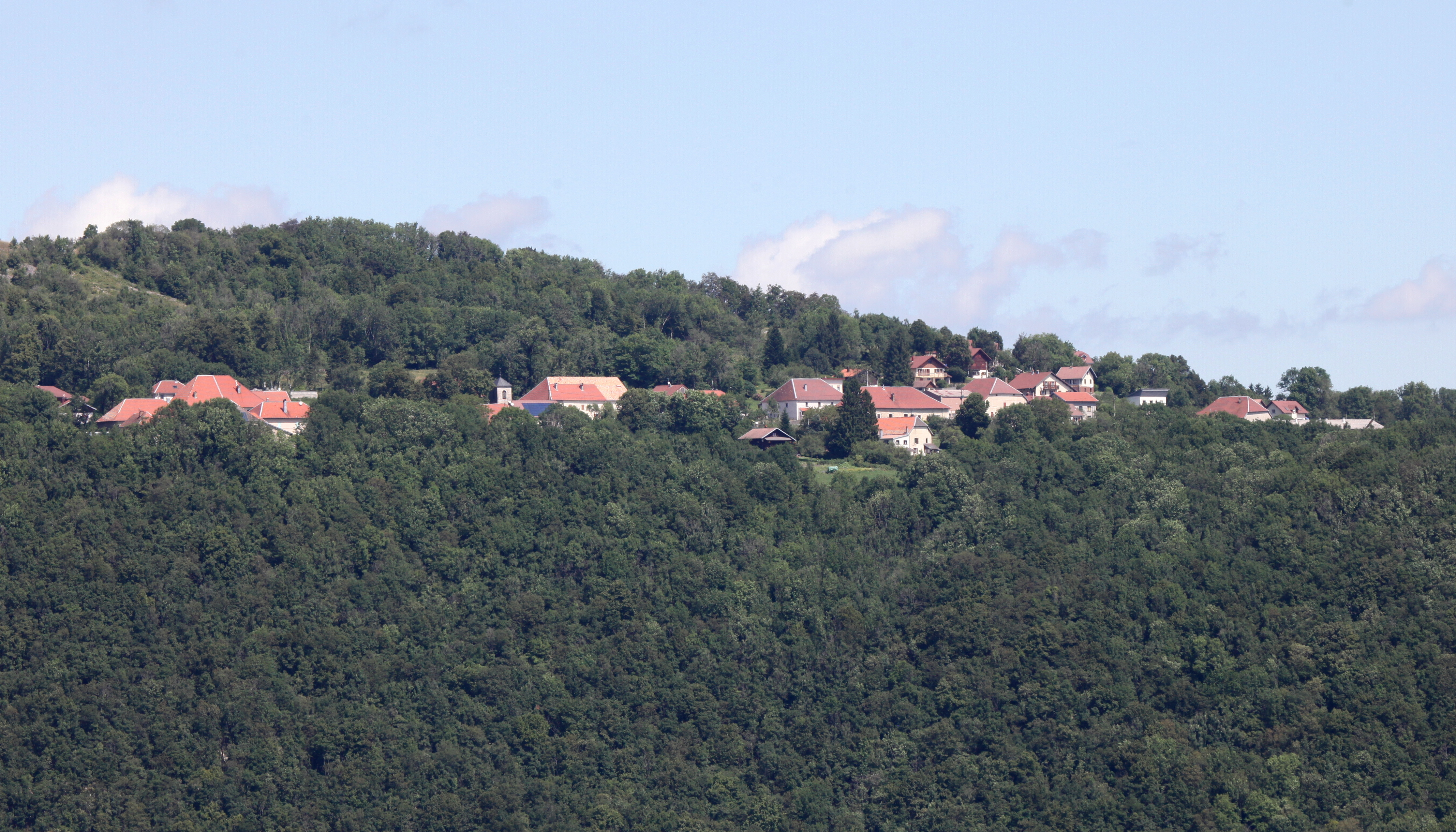 Vue de Hautepierre-le-Châtelet depuis le belvédère de Renédale.